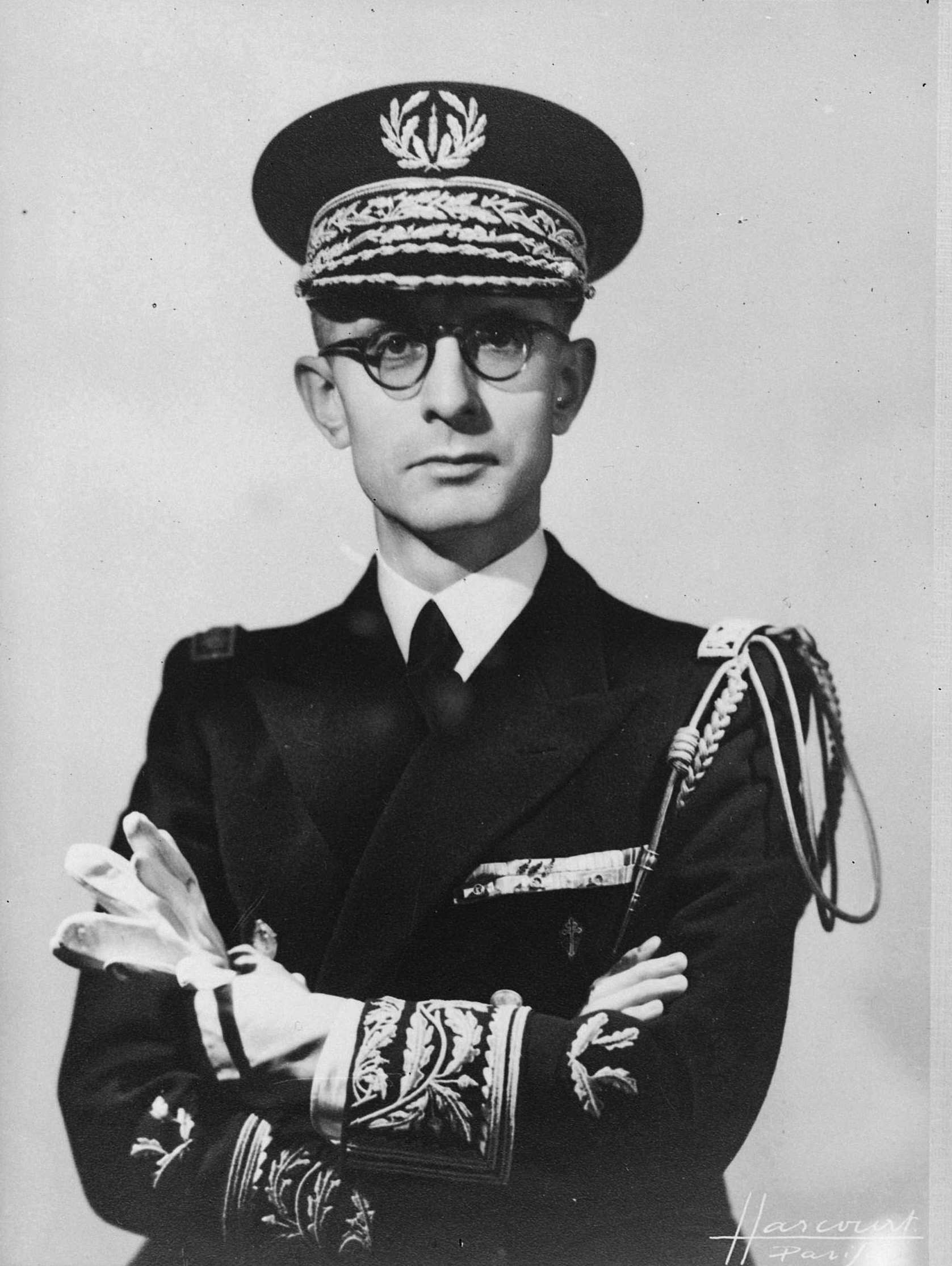 Charles LUIZET, préfet de police de Paris à la Libération